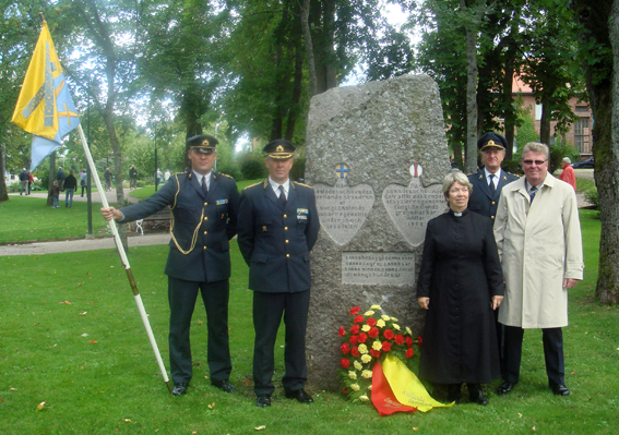 Generalmajor Grundevik vid Hvetlanda skvadrons minnessten